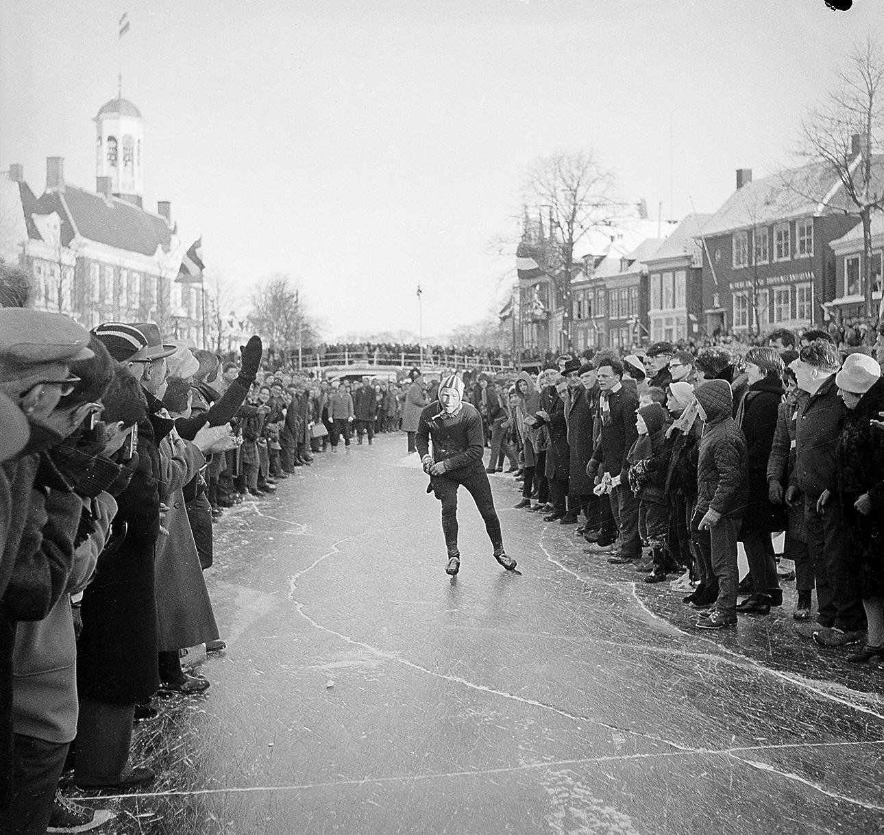 Dokkum. Friese Elfstedentocht: Reinier Paping vertrekt richting Leeuwarden. Links het stadhuis van Dokkum. 18 januari 1963